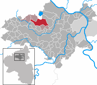 Mendig in Rhineland-Palatinate - district Mayen-Koblenz